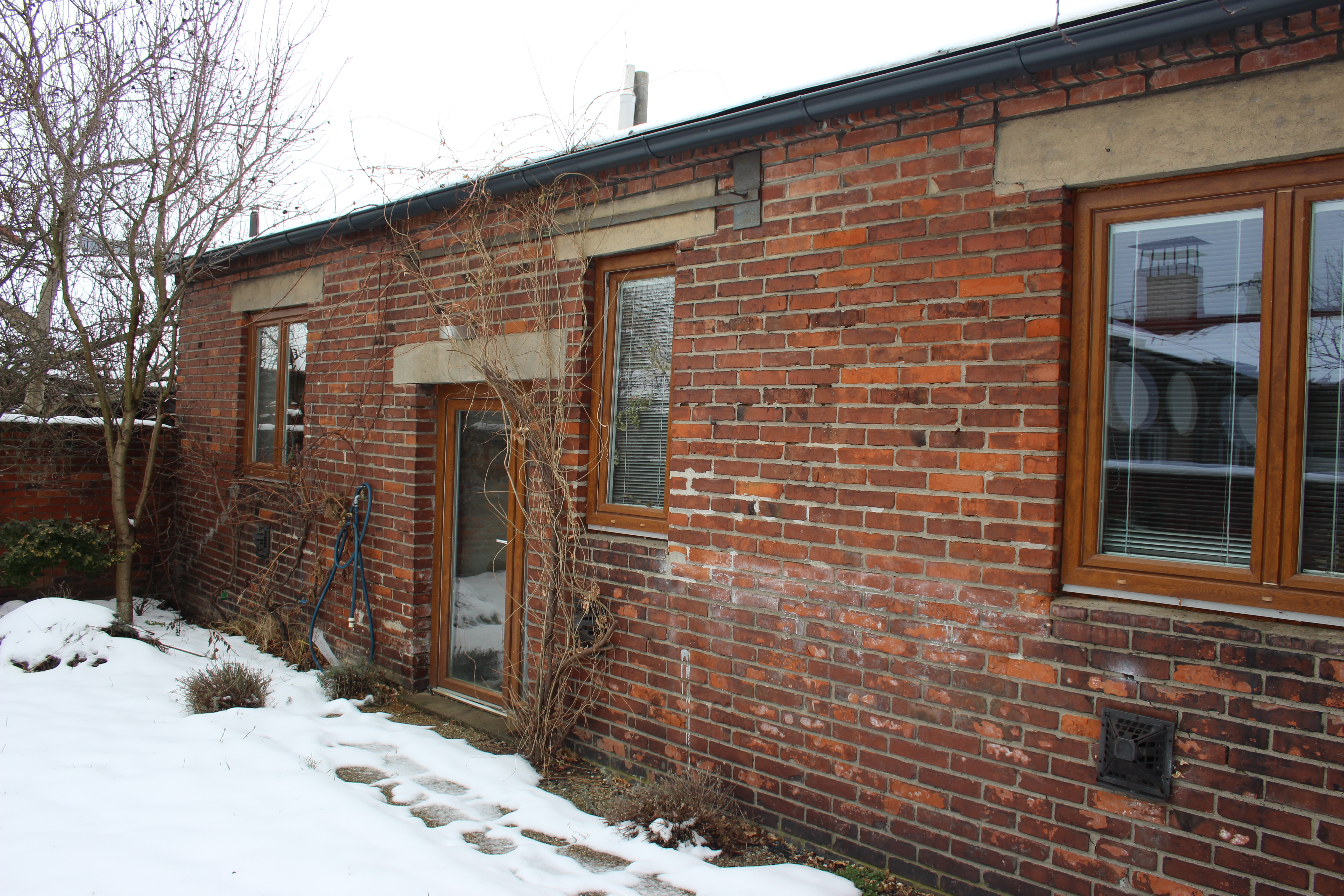 Budova sodovkárny ve dvoře domu čp. 2 v Rybárnách, Uherské Hradiště, Moravní nábřeží.